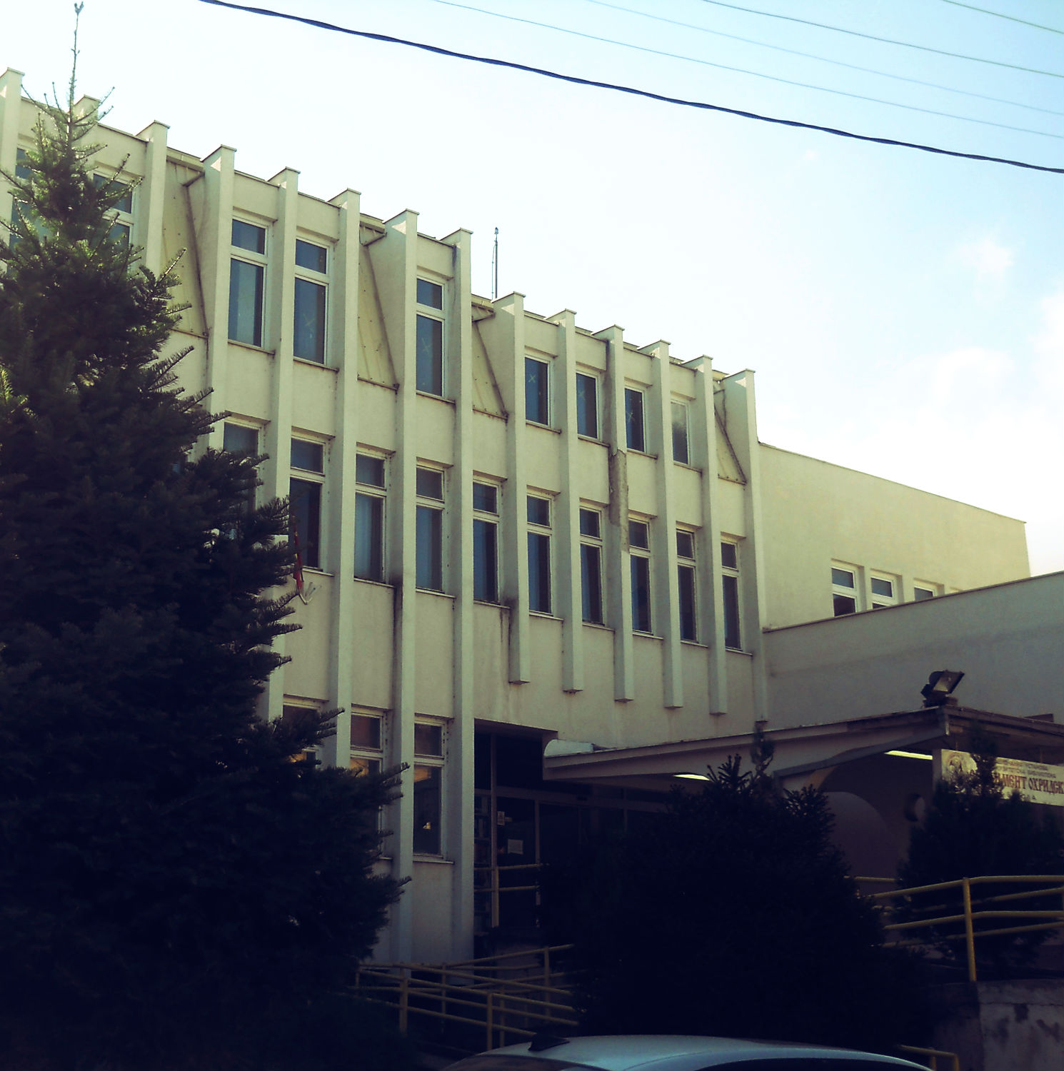 Матична библиотека “Климент Охридски”, ул.”Ленинова”бб Битола